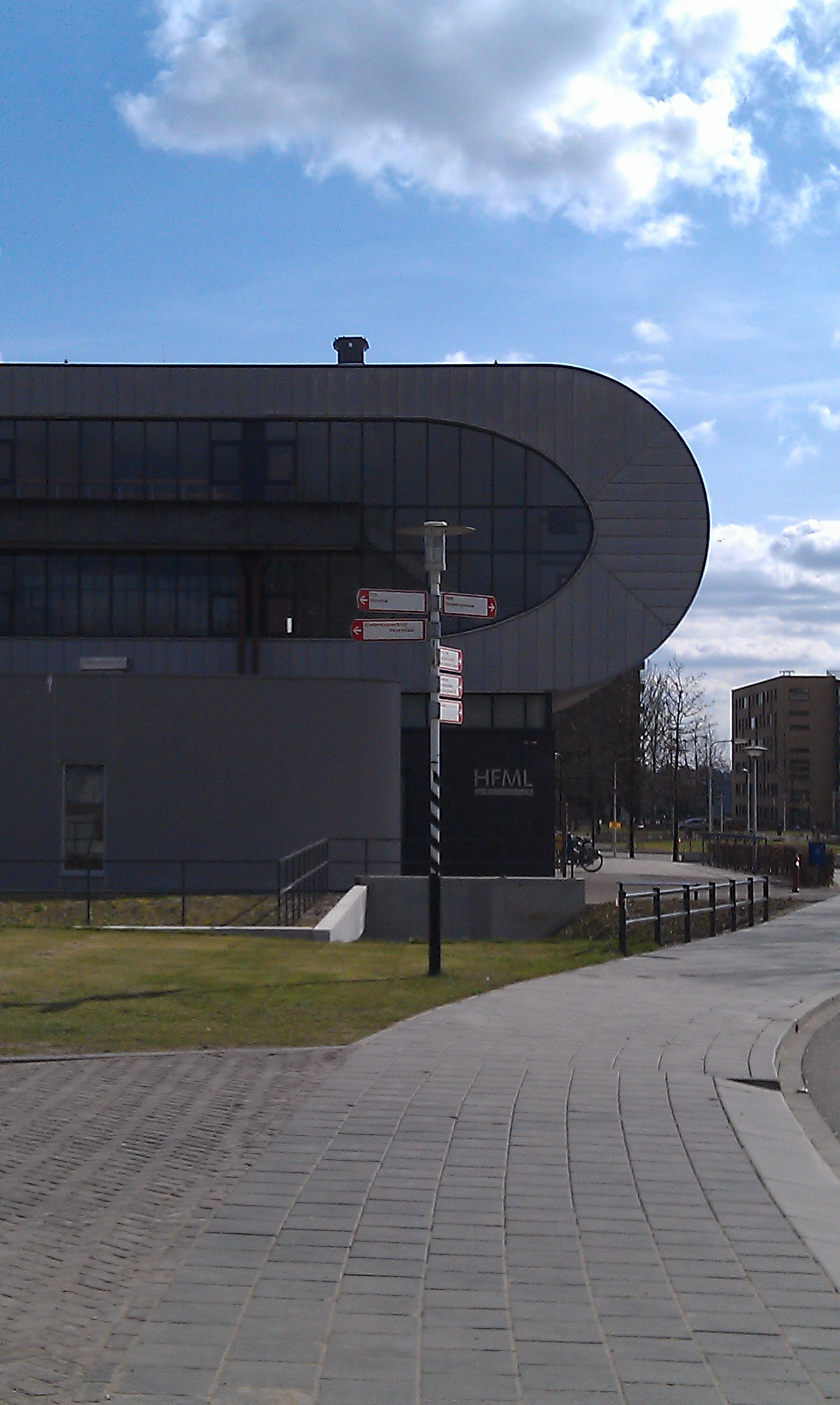 Magnetenlab van de Radboud Universiteit in Nijmegen